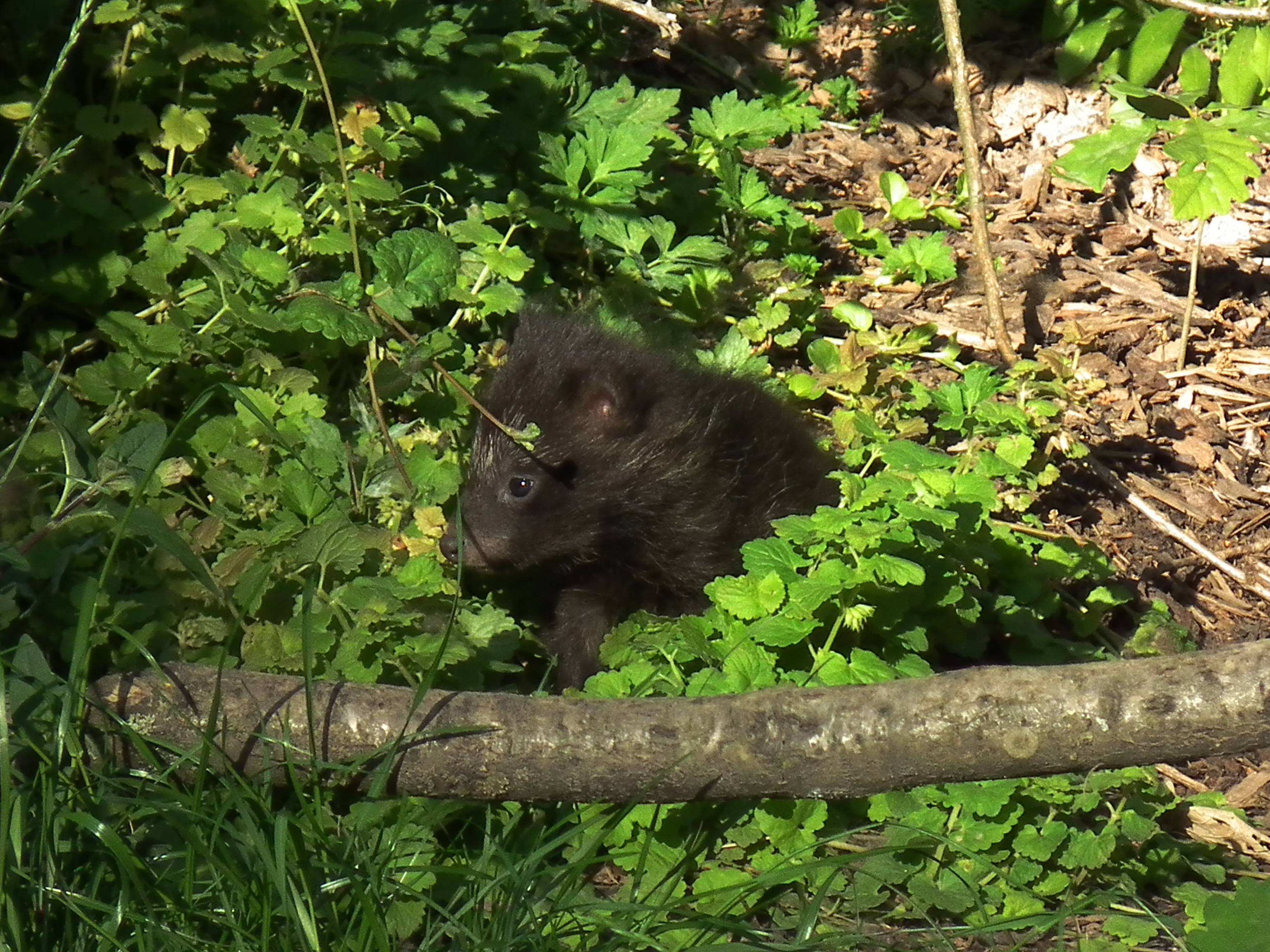 Marderhund (Nyctereutes procyonoides) im Wildpark Pforzheim (Baden-Württemberg, Deutschland)